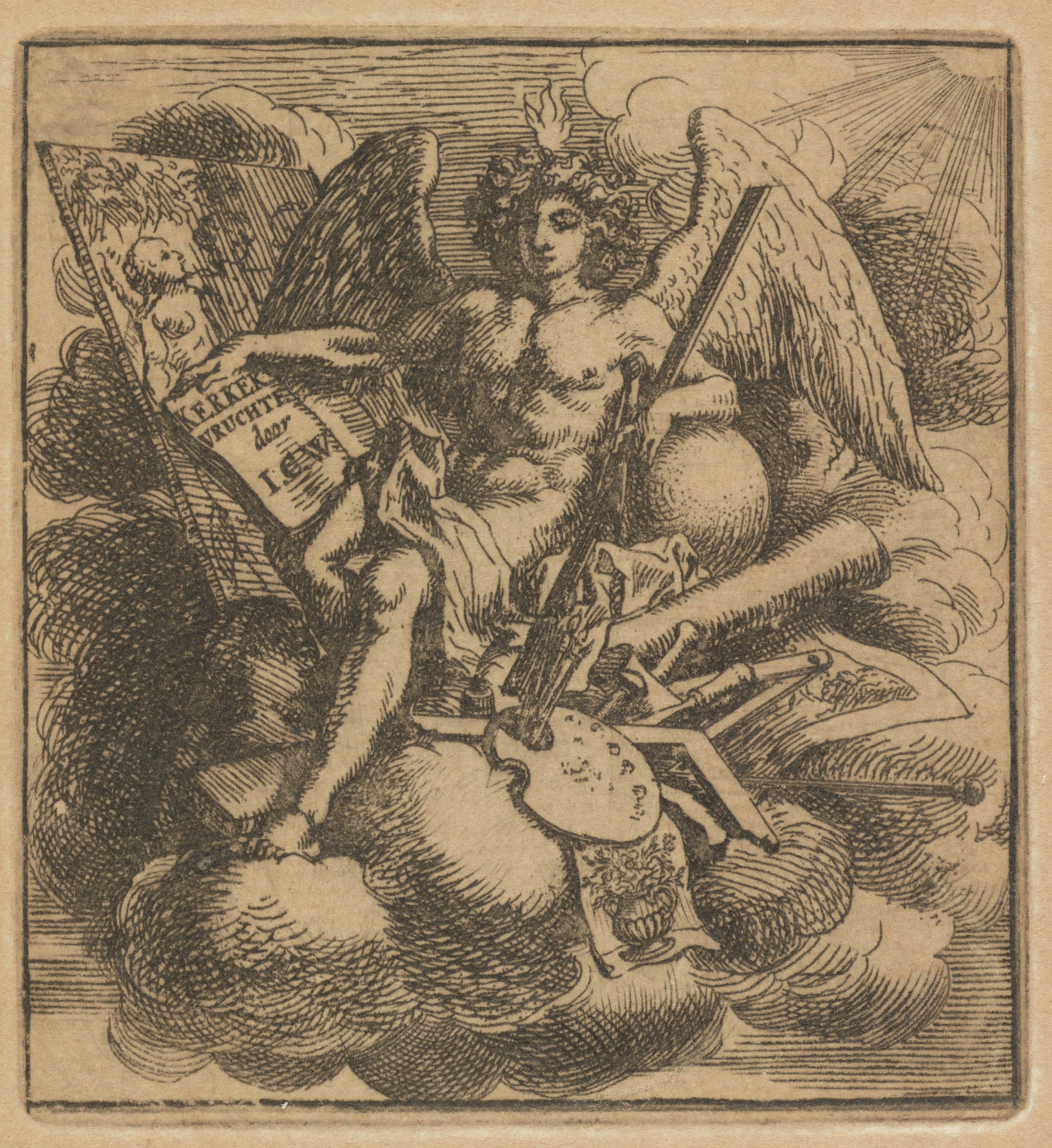 IdentificatieTitel(s): Allegorie op de schilderkunstObjecttype: prent Objectnummer: RP-P-OB-61.167Opschriften / Merken: verzamelaarsmerk, verso linksonder, gestempeld: Lugt 240Omschrijving: Een mannelijke, gevleugelde allegorische figuur op de wolken. De vlam van Inspiratie brandt boven zijn hoofd. Hij is omringd door diverse schildersattributen. In zijn hand een vel Waar: op: "Kerekvruchten".VervaardigingVervaardiger: prentmaker: Jacob Campo Weyerman (vermeld op object)Plaats vervaardiging: Noord-NederlandDatering: 1687 - 1747Fysieke kenmerken: etsMateriaal: papier Techniek: etsenAfmetingen: plaatrand: h 85 mm × b 78 mmOnderwerpWat: Inspiration; 'Ispiratione' (Ripa)tools, implements of painter'Pictura', symbolic representations, allegories and emblems ~ painting; 'Pittura' (Ripa)Verwerving en rechtenVerwerving: overdracht van beheer 1816Copyright: Publiek domein